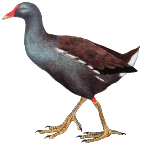 Dibujo de una polla de agua. Gallinula chloropus